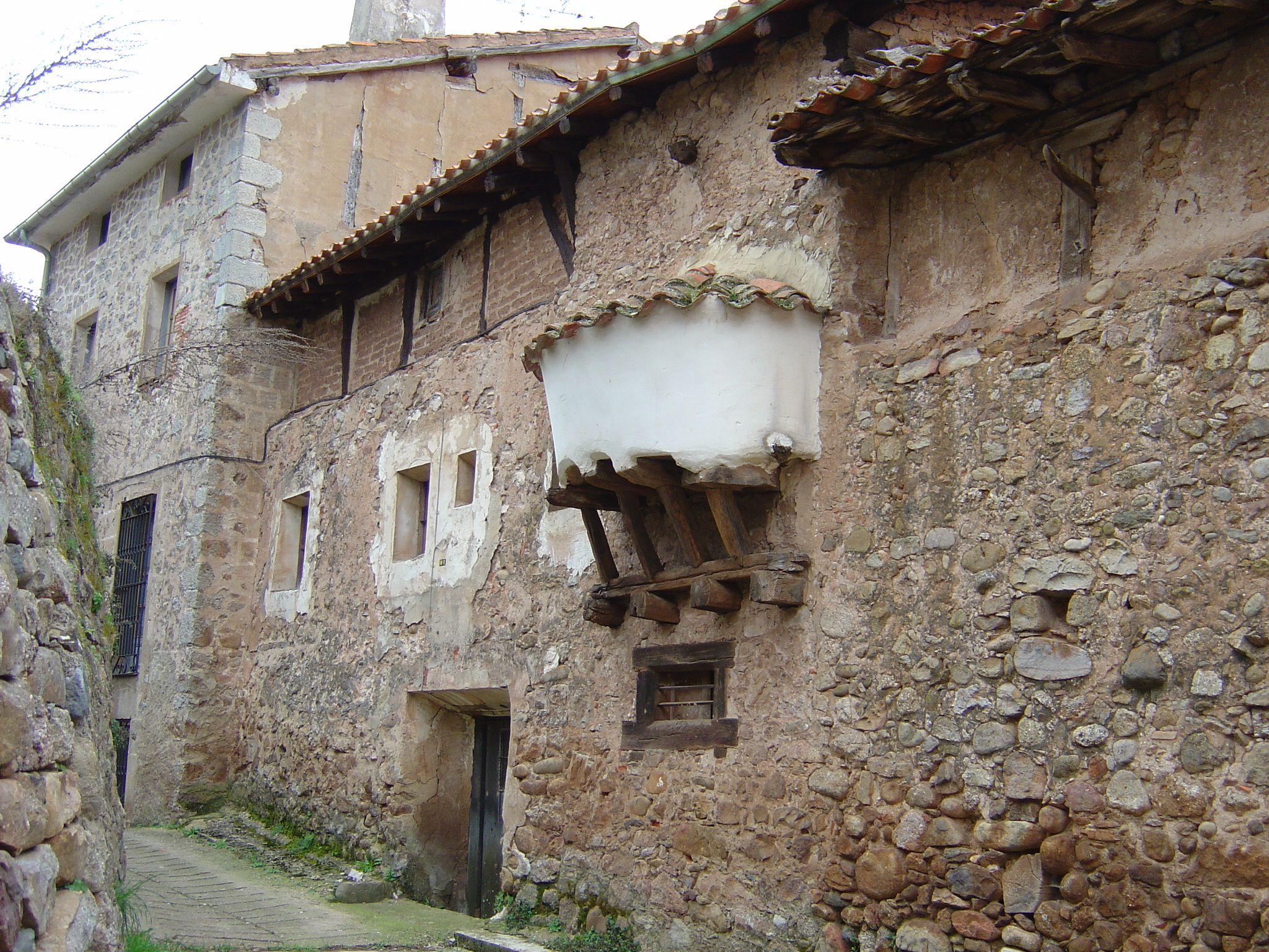 Pradillo de Cameros. La Rioja